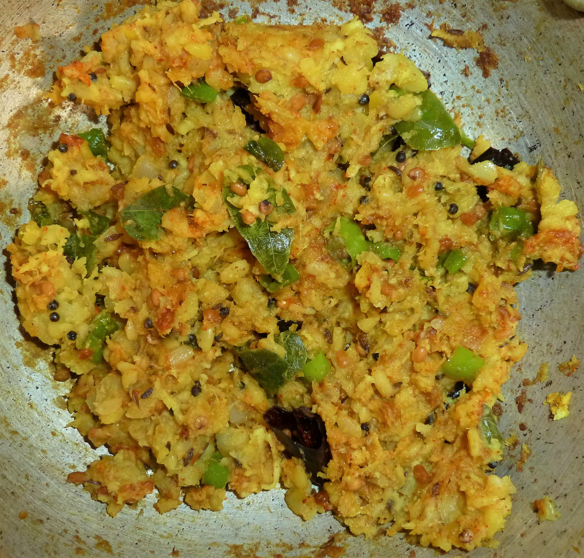 అటుకుల ఉప్మా (పోహా)